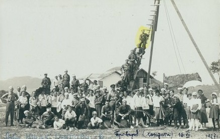 Членове на дружество „Юнак“ - Габрово на екскурзия в Провадия. Солната сонда, 1927 г.